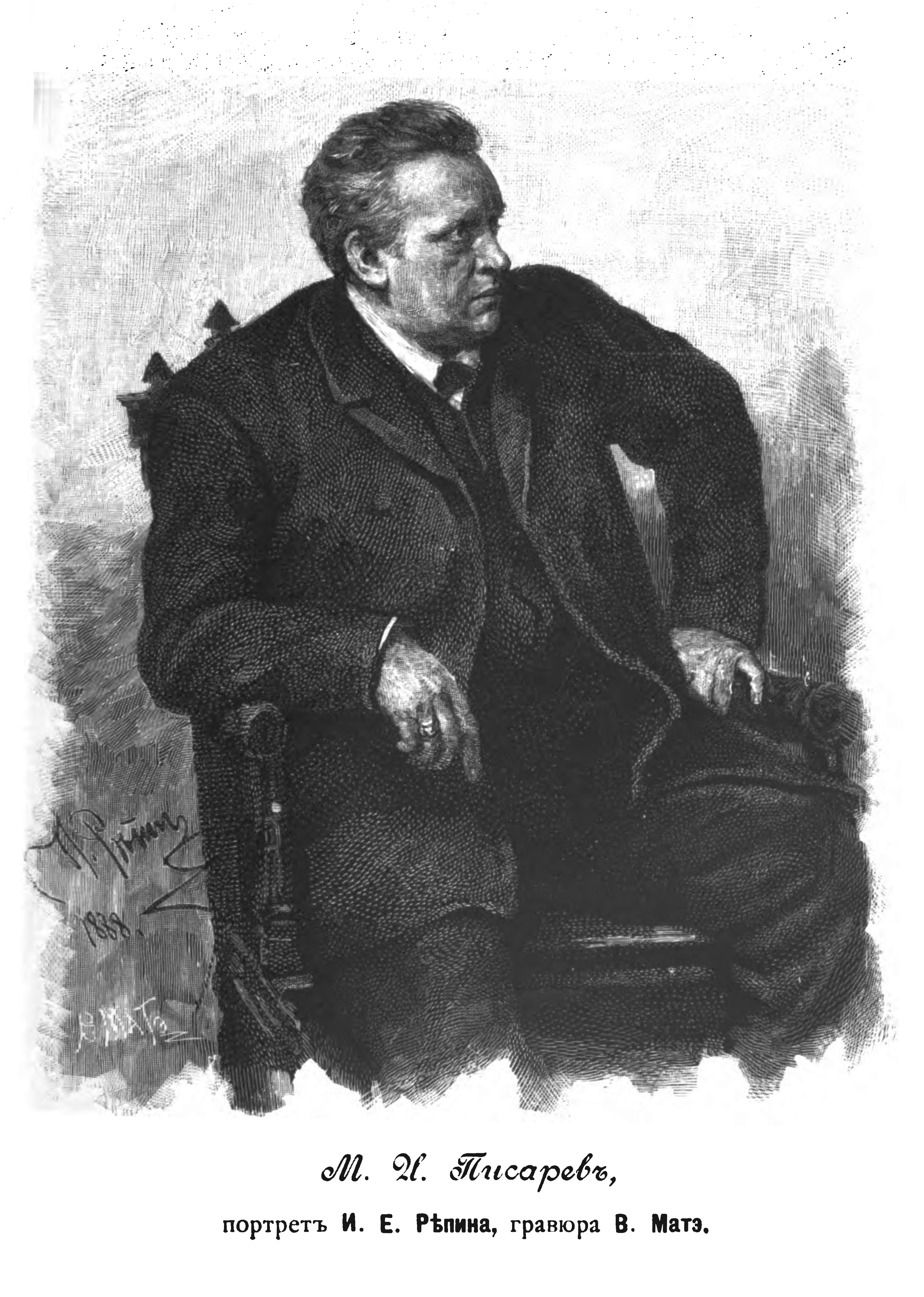 Модест Иванович Писарев. Портрет И. Е. Репина. Гравюра В. Мате.